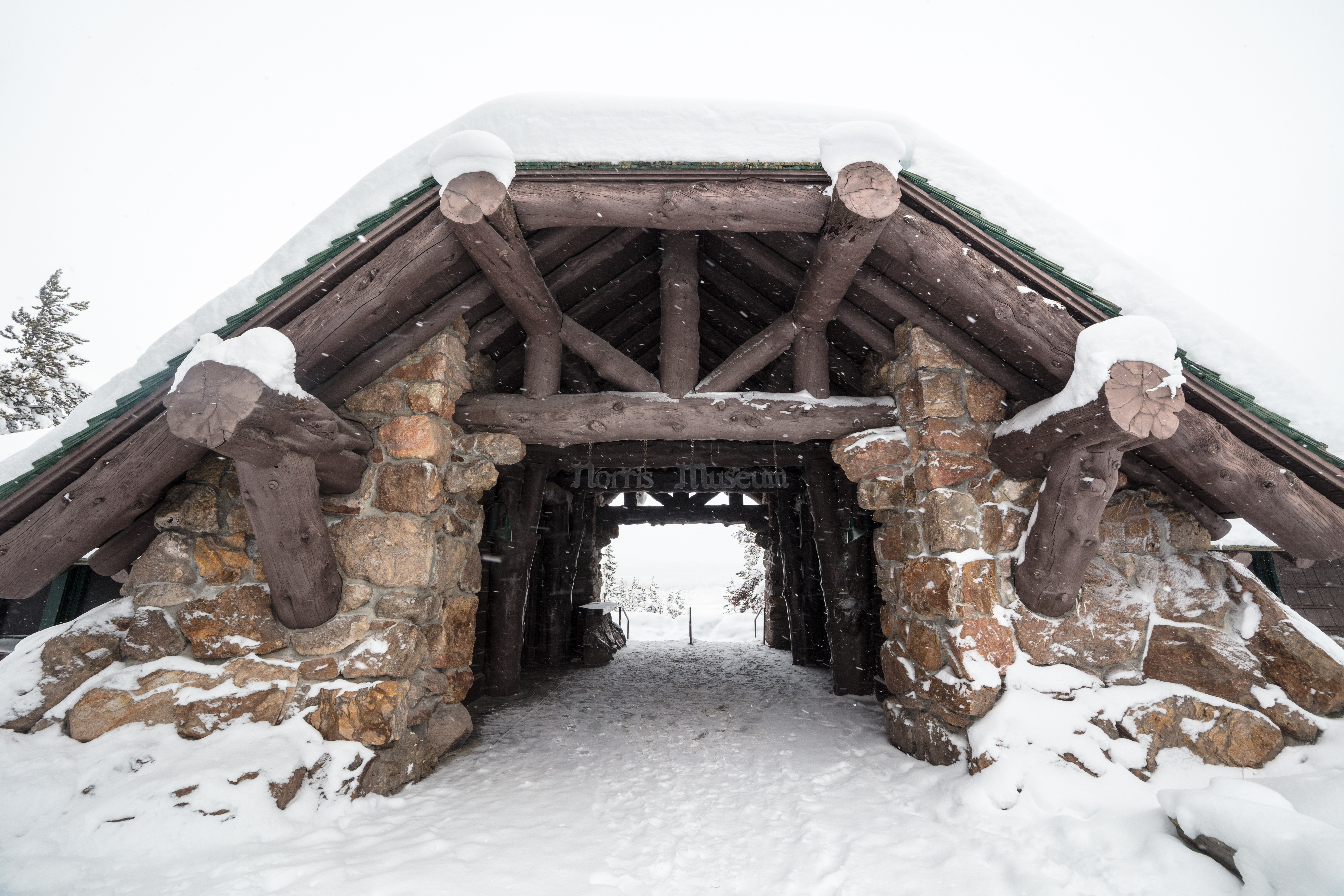 NPS / Jacob W. Frank